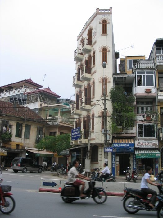 Description: Hanoi railstation side. Source: Camille Harang